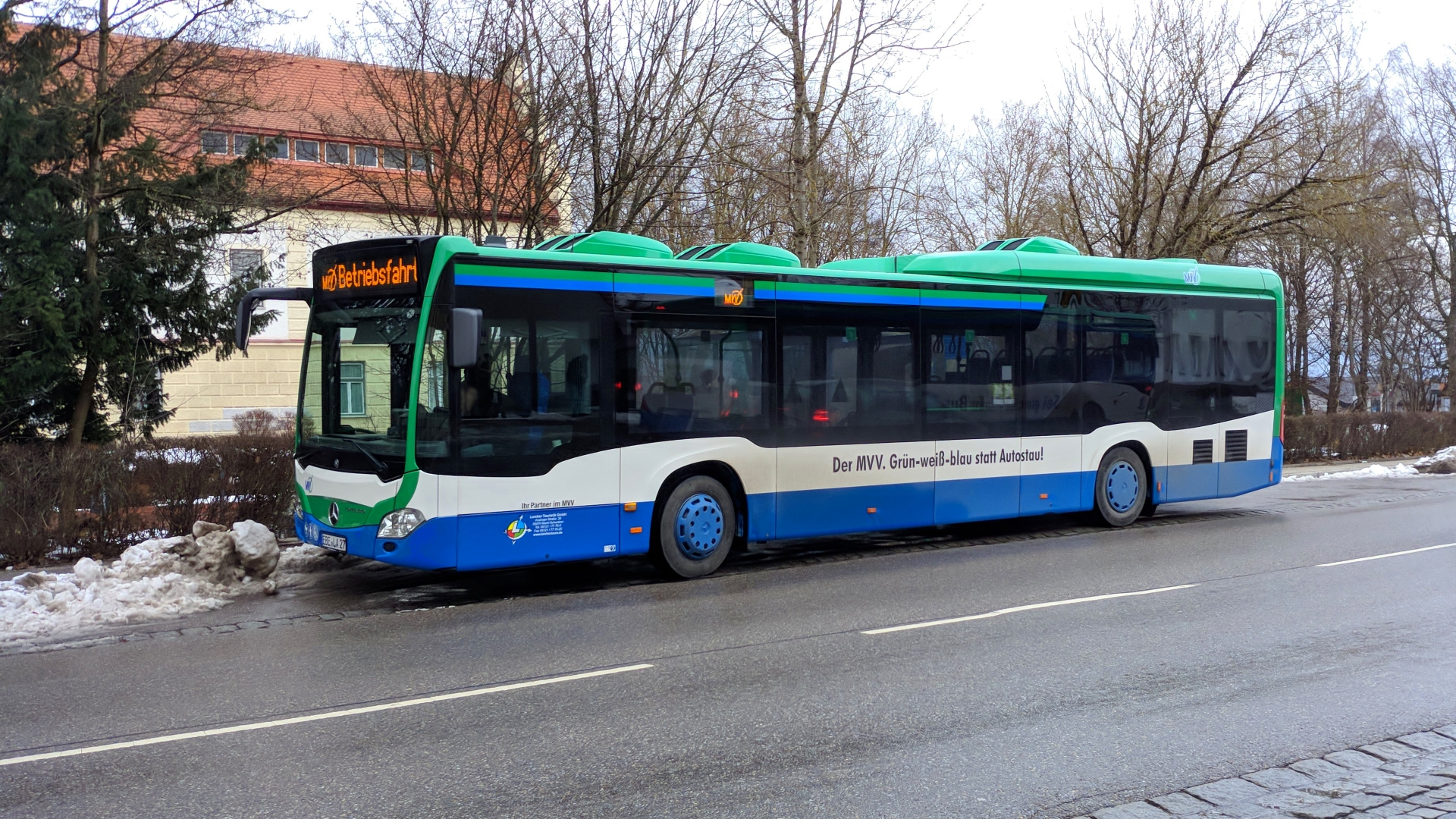 Ein Linienbus der Firma Larcher Touristik aus Markt Schwaben, Typ Mercedes-Benz Citaro 2 LE, vor dem Markt Schwabener Rathaus.